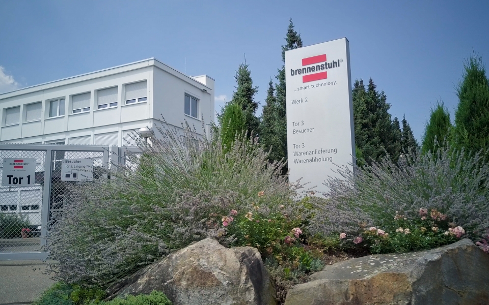 Das Werk II der Hugo Brennenstuhl GmbH & Co Kommanditgesellschaft in Tübingen